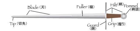 Sword parts